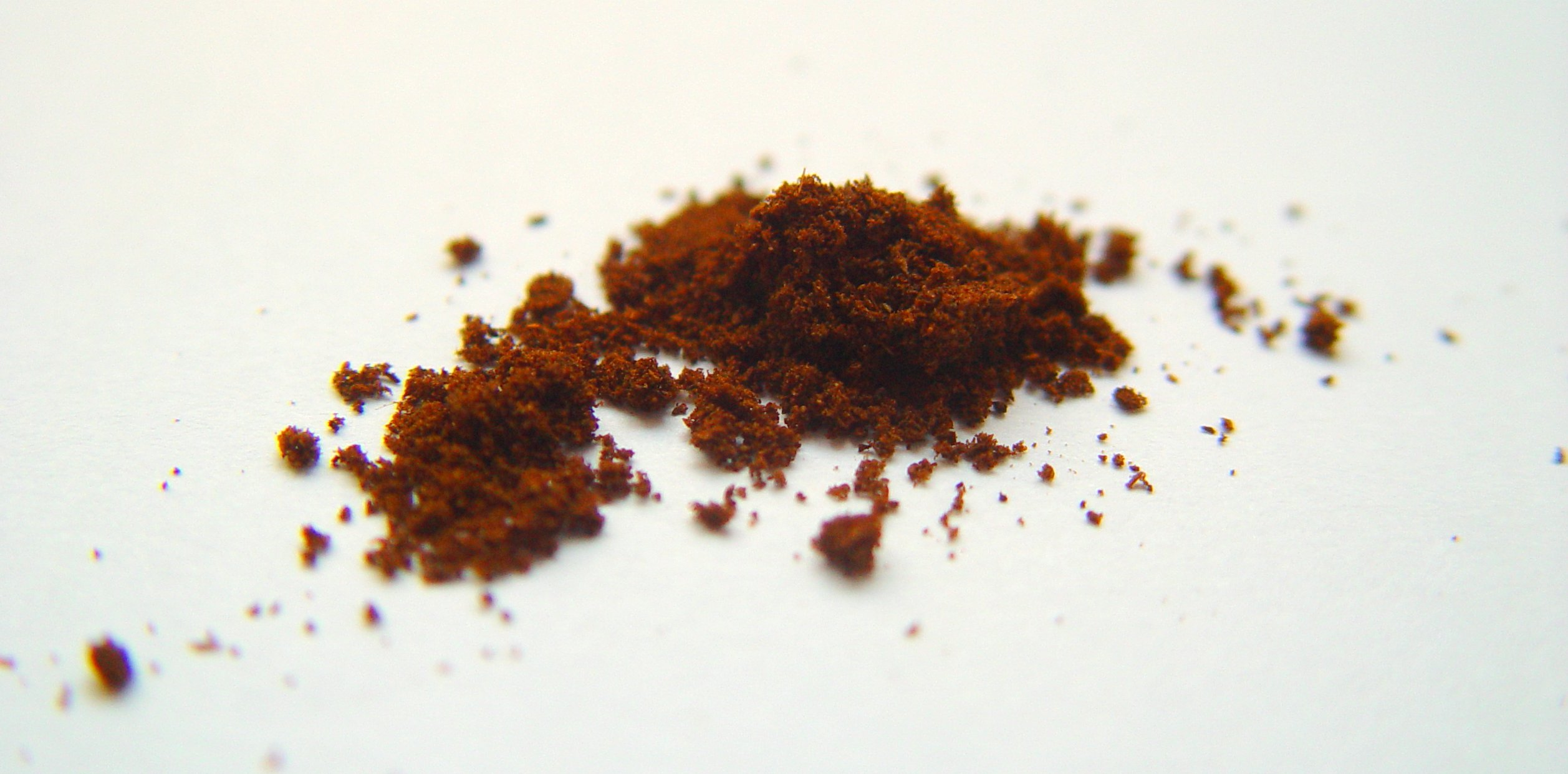 Kupka tabaki